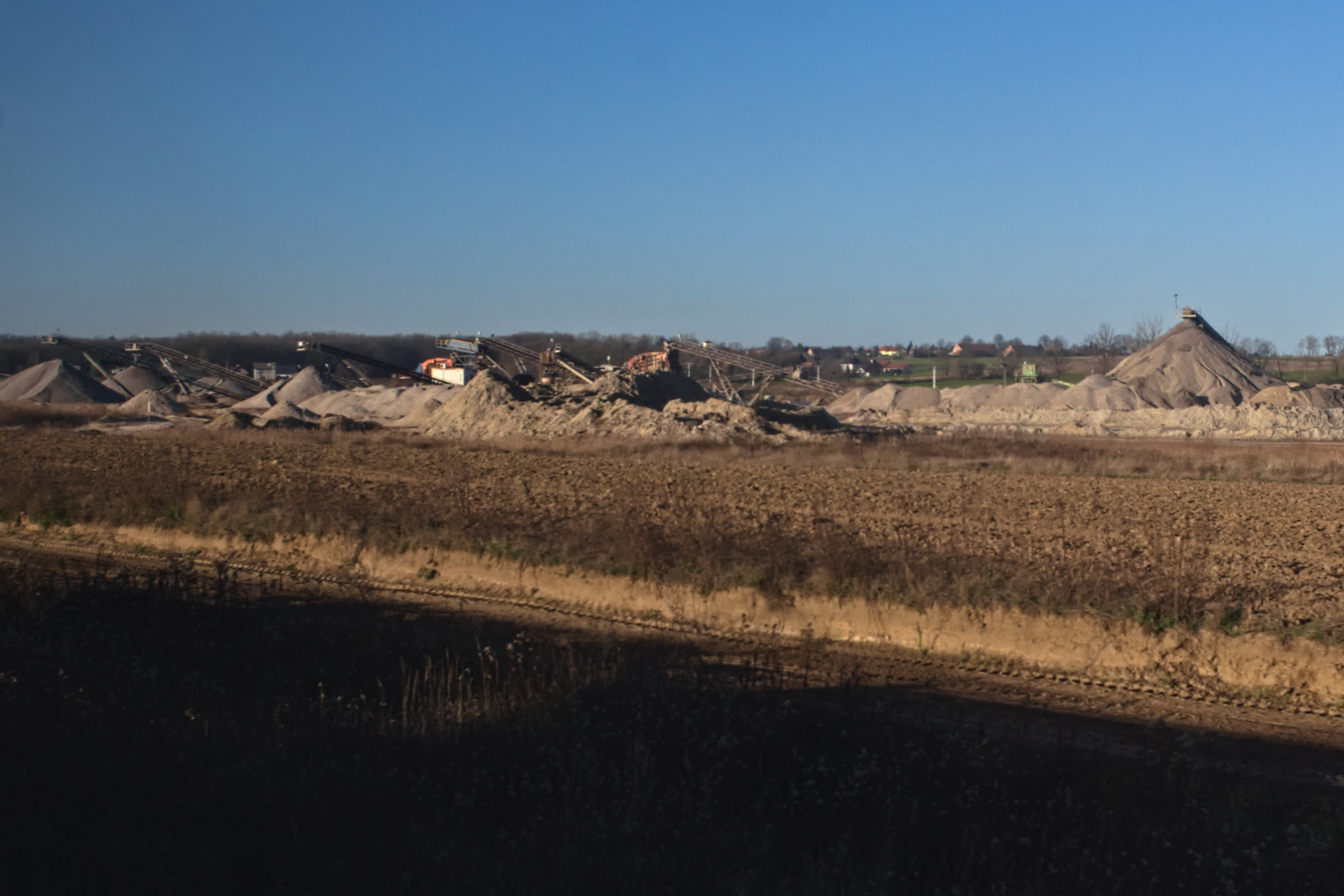 kopalnia kruszyw naturalnych Stróża w Stróży, należy do Kopalni Surowców Mineralnych Byczeń